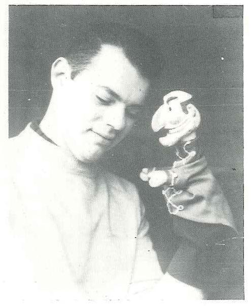 Henrique Delgado com um fantoche